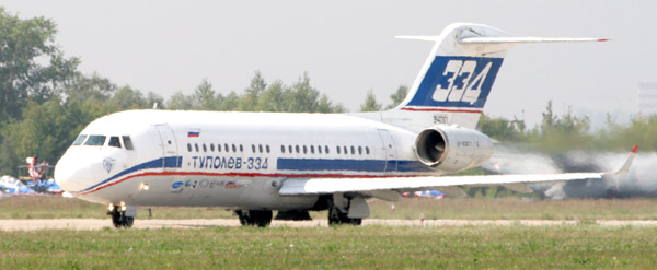 Самолёт Ту 334. Демонстрационный полёт на МАКС-2007